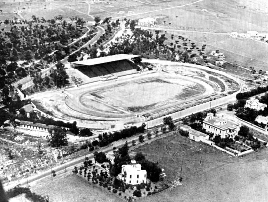 Stade Municipal Géo André, Tunis, Tunisie